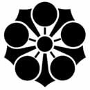 剣梅鉢 菅原氏流高辻家分流